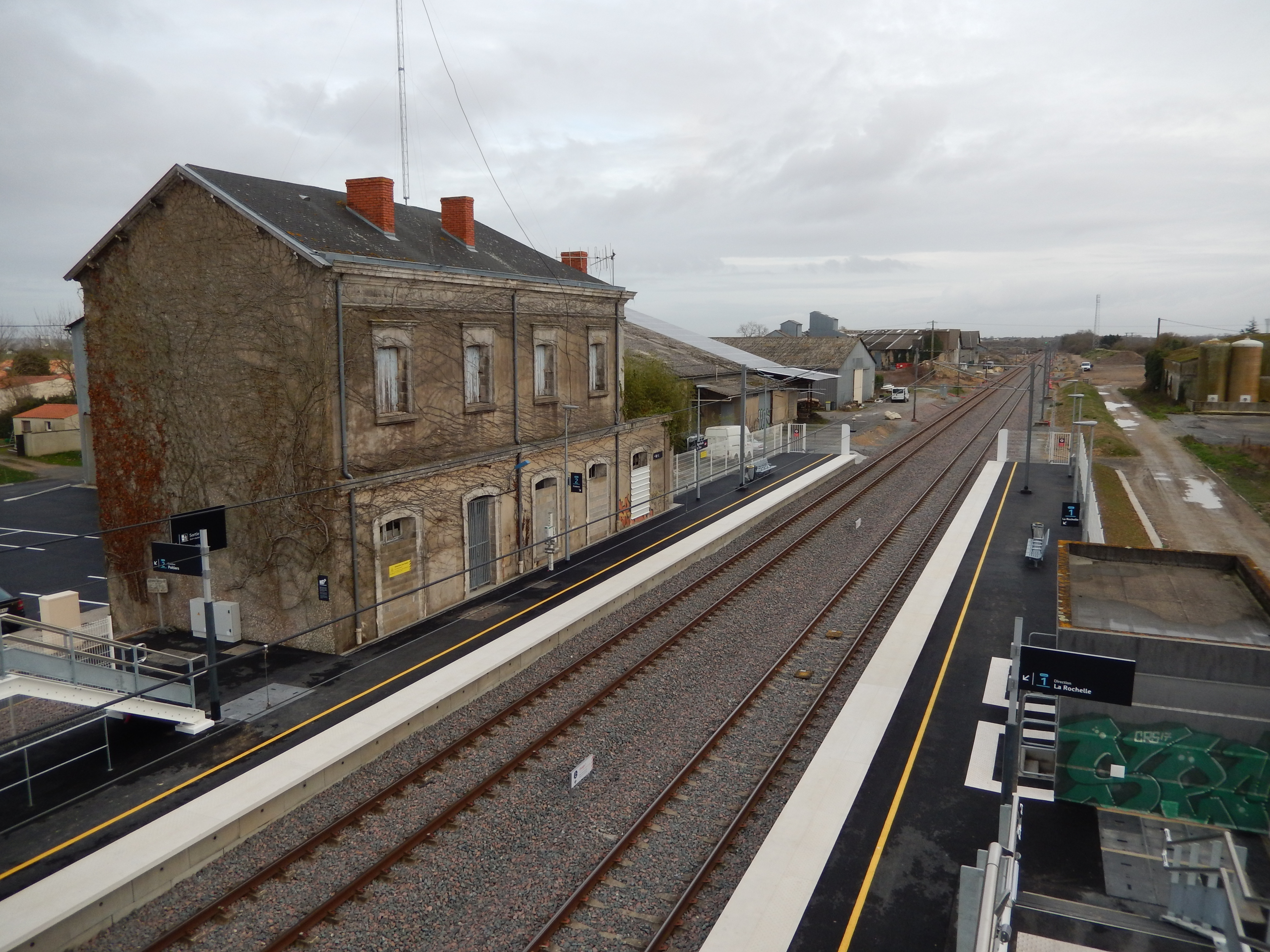 Une vue en plongée de la gare SNCF d'Aigrefeuille - Le Thou (Charente-Maritime, France).